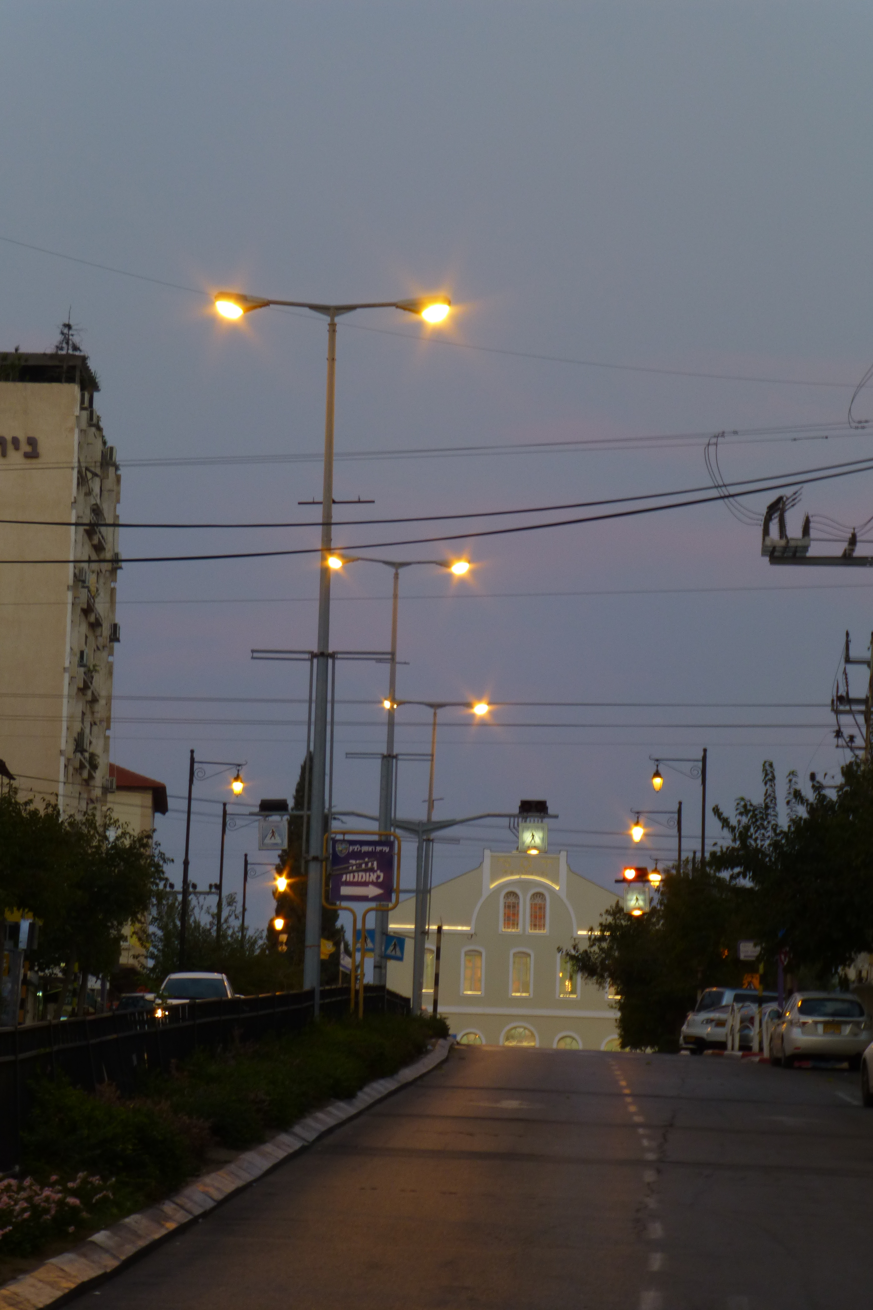 בית הכנסת הגדול בראשון לציון נבנה בשנים 1885–1889, והיווה מוקד חשוב בחיי המושבה. בית הכנסת ניצב על פסגת גבעה, בקצה רחוב רוטשילד וכיכר המייסדים במפגש עם רחוב אחד העם, והוא בולט למרחוק.